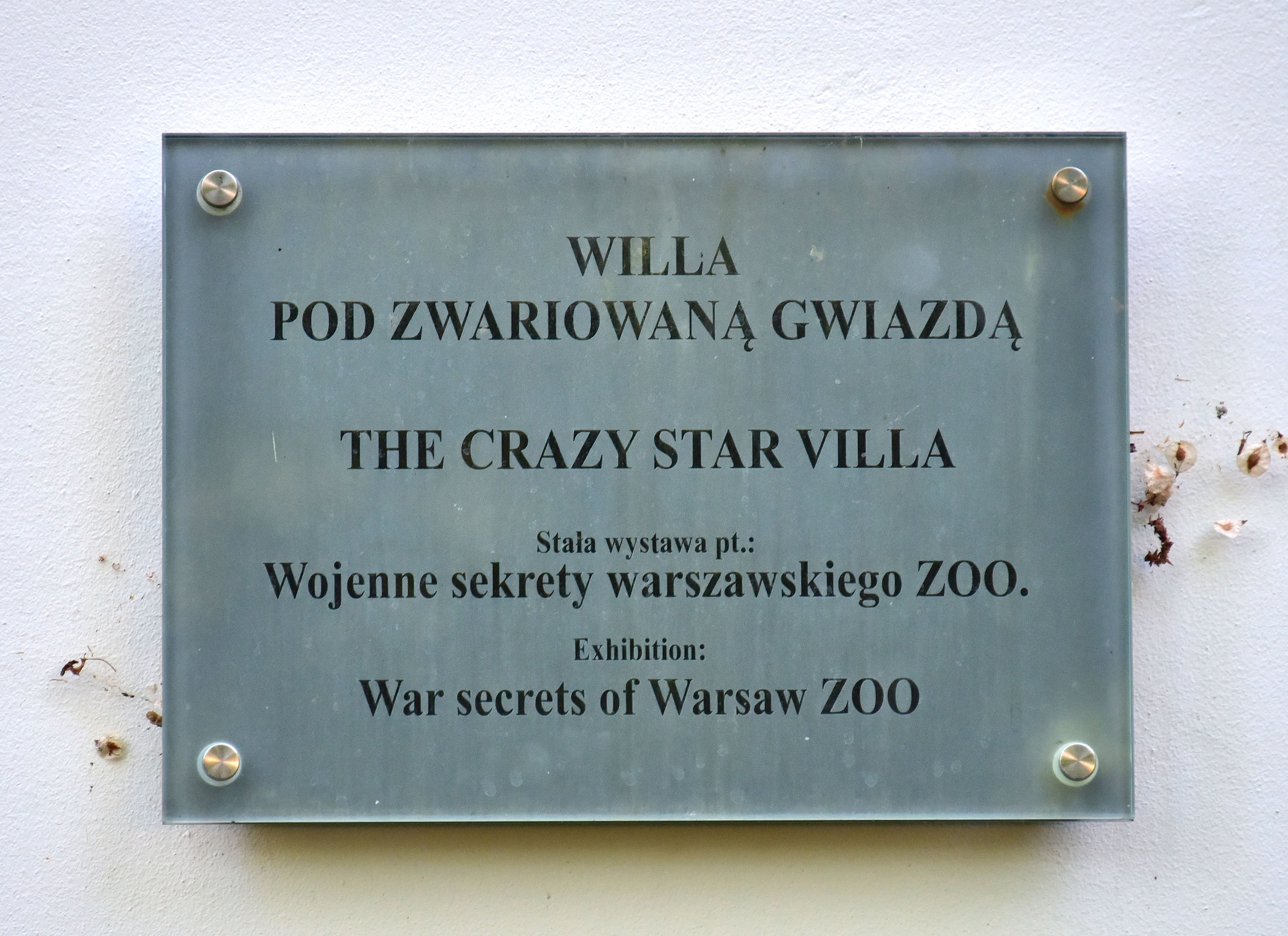 Tablica na willi Pod Zwariowaną Gwiazdą w Ogrodzie Zoologicznym w Warszawie